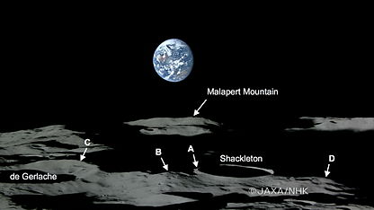 南极永昼峰照片